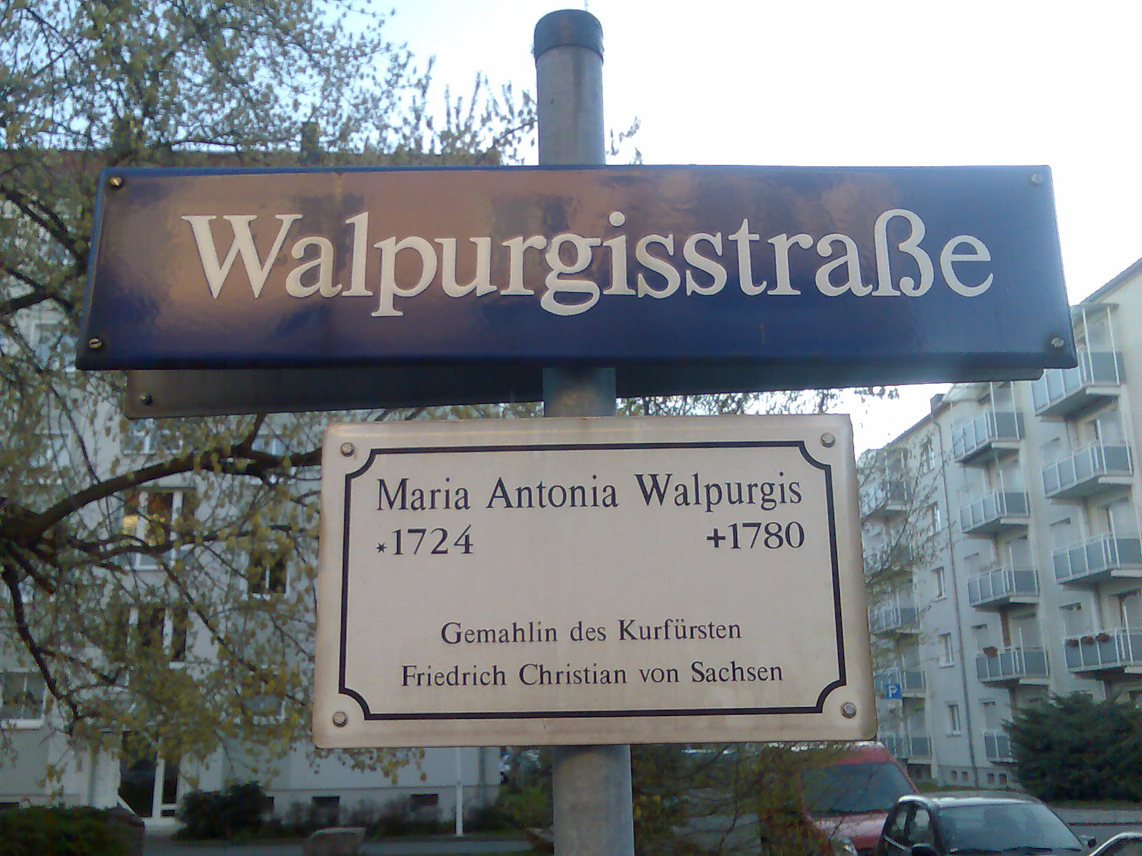 Walpurgisstraße, Straßenschild und Erklärungstafel in Dresden